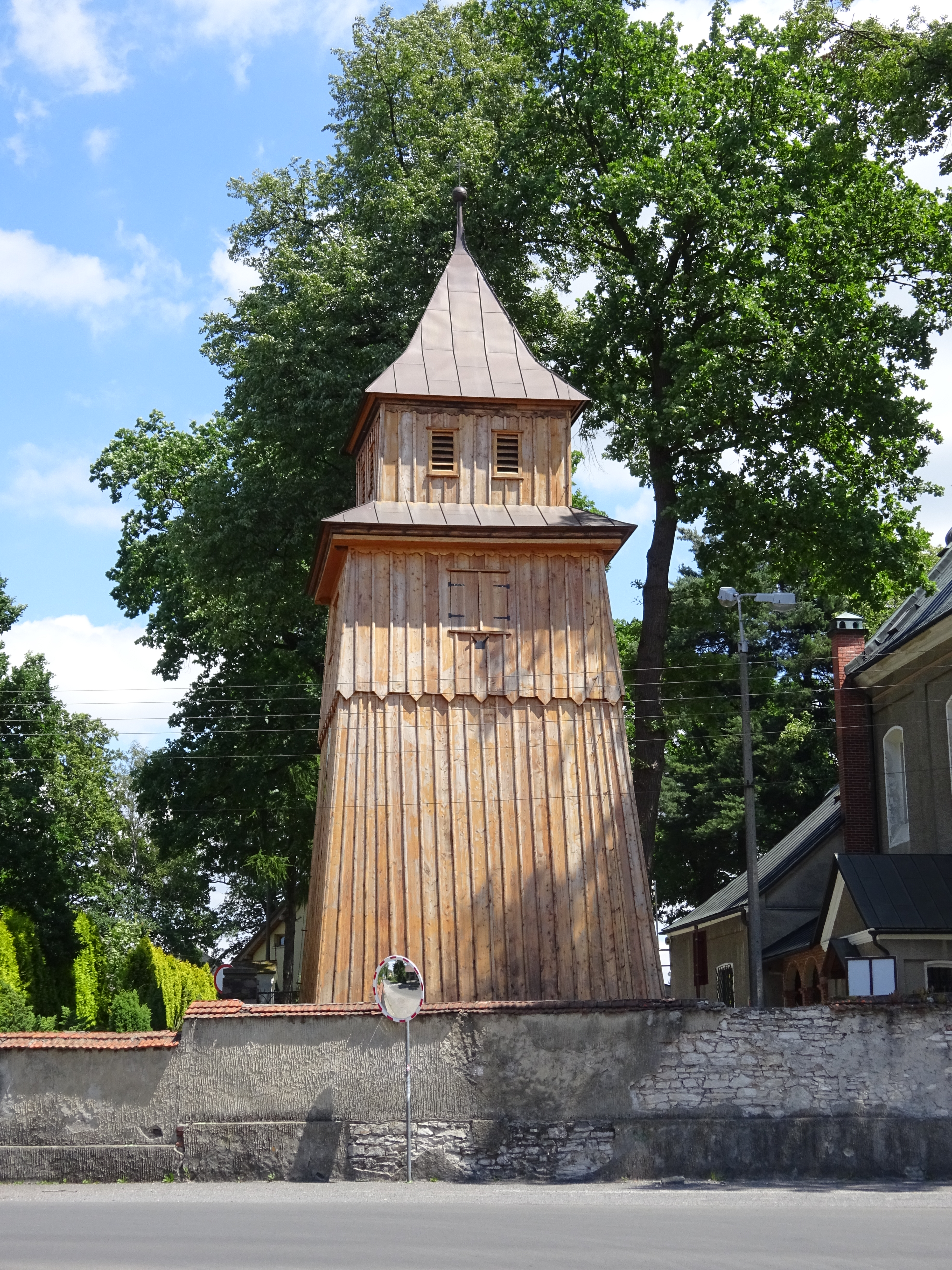 Dzwonnica wolnostojąca, drewniana, osiemnastowieczna przy Kosciele św. Katarzyny w Tenczynku.